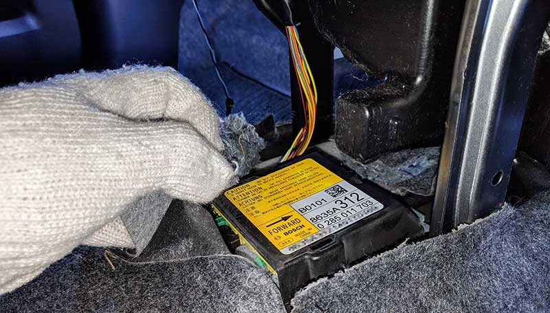 日産・デイズ / 三菱・eK用のエアバッグECU。マニュアルには、イベントデータレコーダー（EDR）としての機能を備える旨の記載がある。部品の製造はボッシュ製。